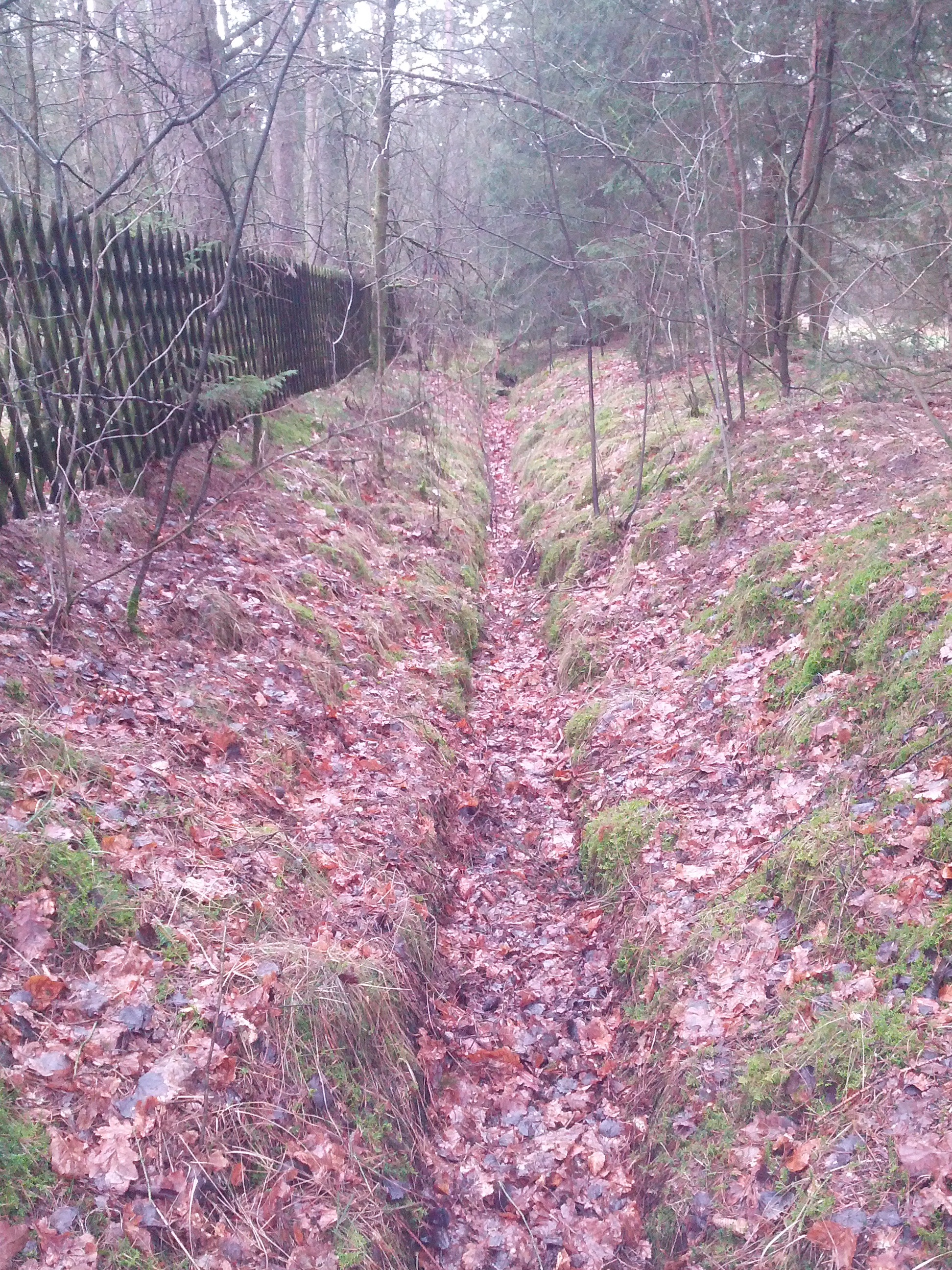 Eest as dröög Beek in Ehrhoorn bi dat fröhere Krankenhuus Wintemaur